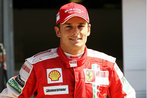 Fisichella fotografato durante il gran premio di Monza 2009 - Prima apparizione ufficiale in Ferrari